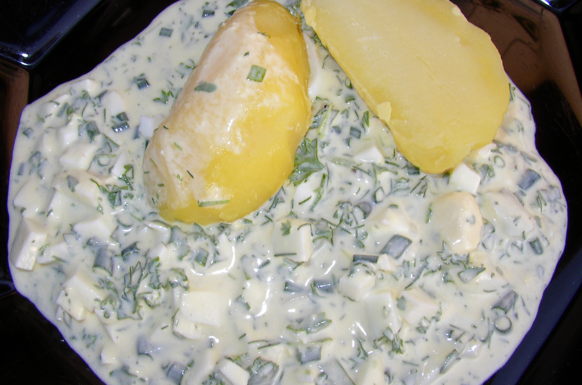 Unser Rezept befindet sich hier